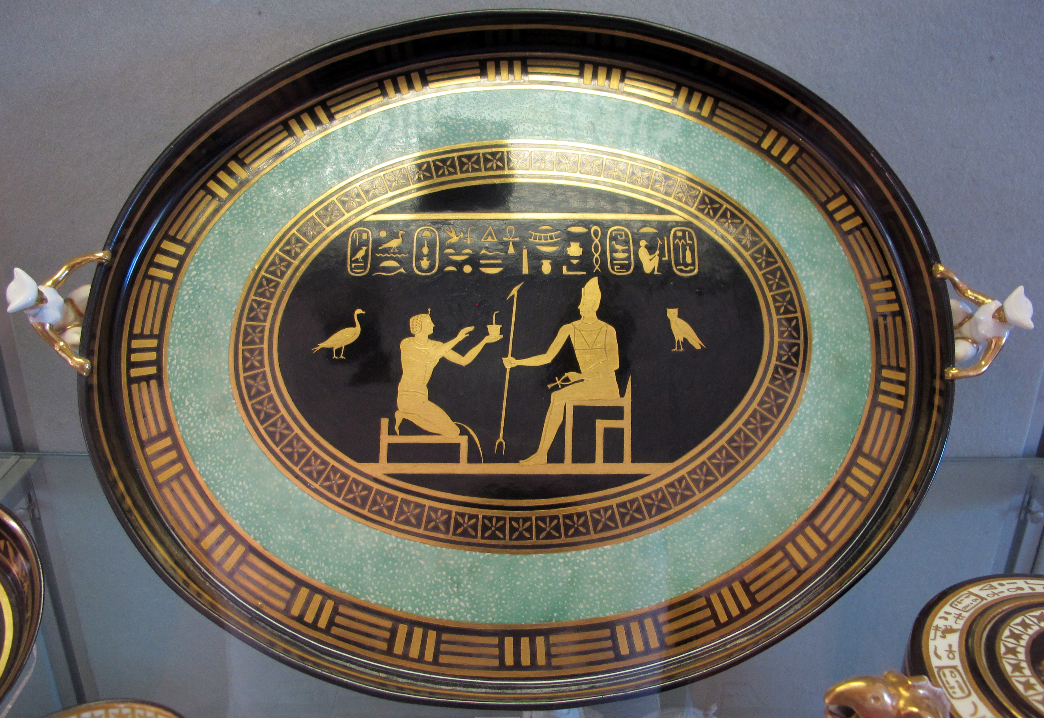 Porcelain Museum (Florence) - Capodimonte porcelain